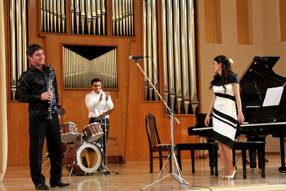 Bakı musiqi akademiyasında konsert.